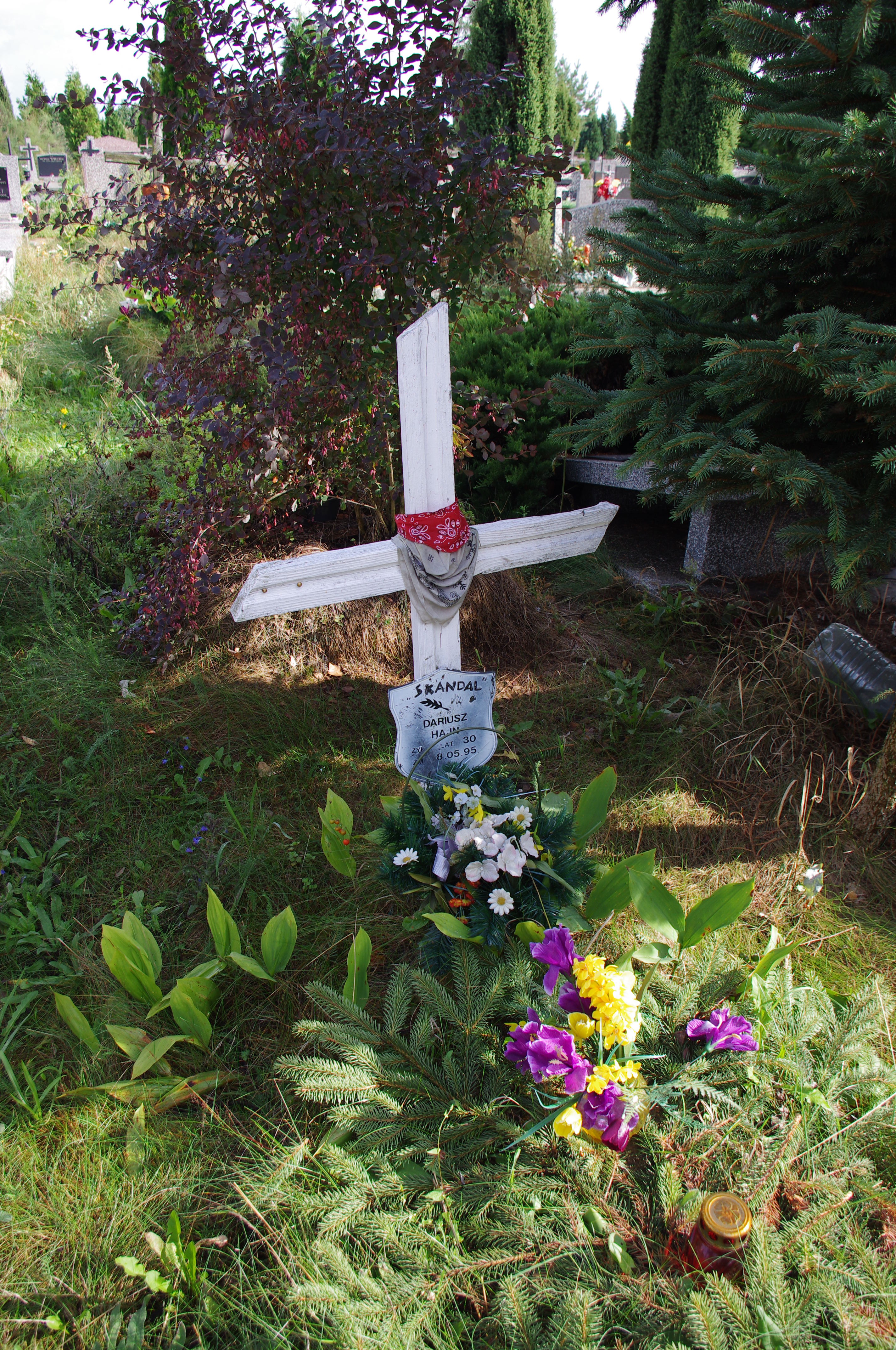 Grób wokalisty punkowego Dariusza Hajna na Cmentarzu Komunalnym Północnym w Warszawie